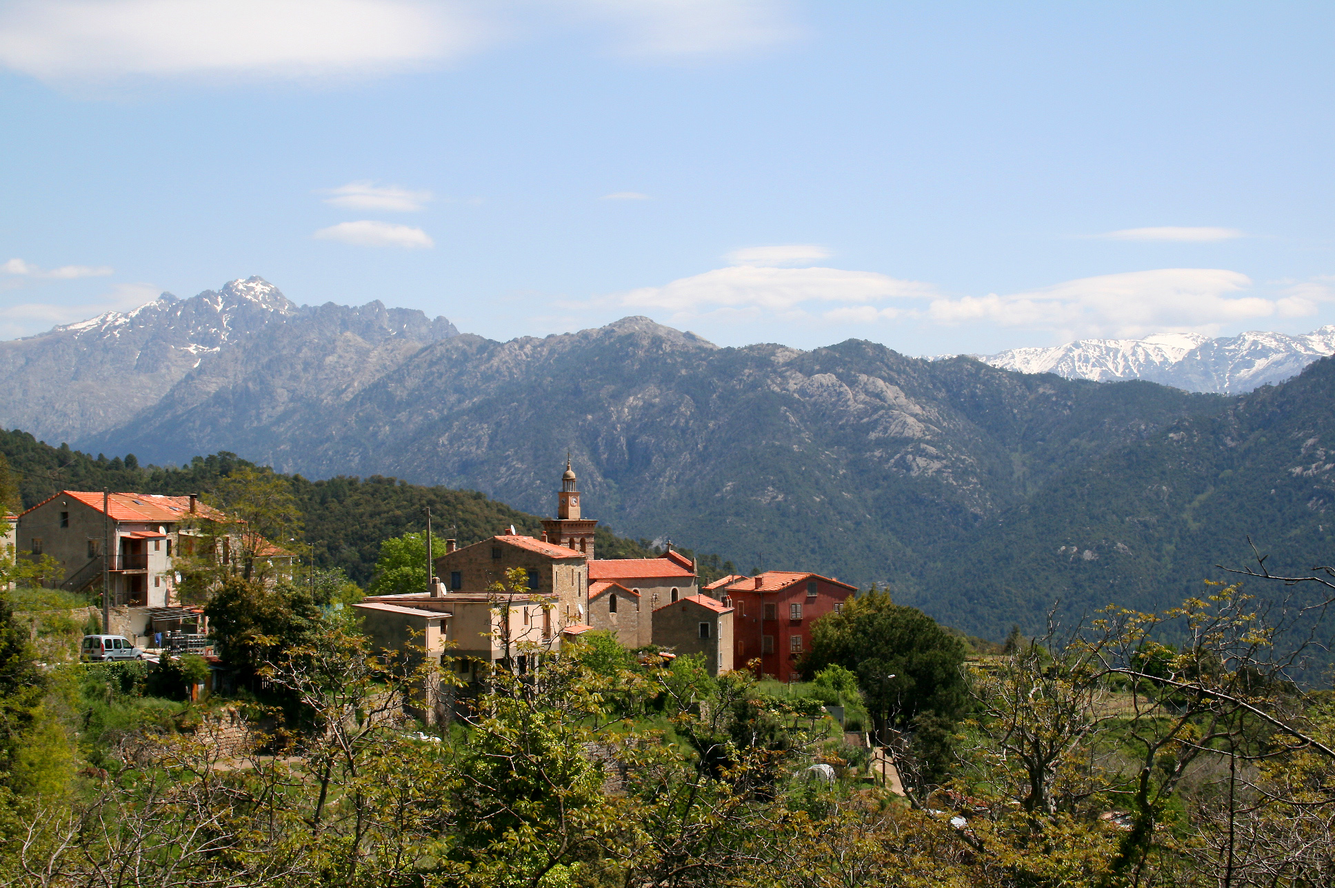 Salice France (Corse du Sud), le quartier de l'église.